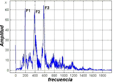 Aparato Fonador Humano